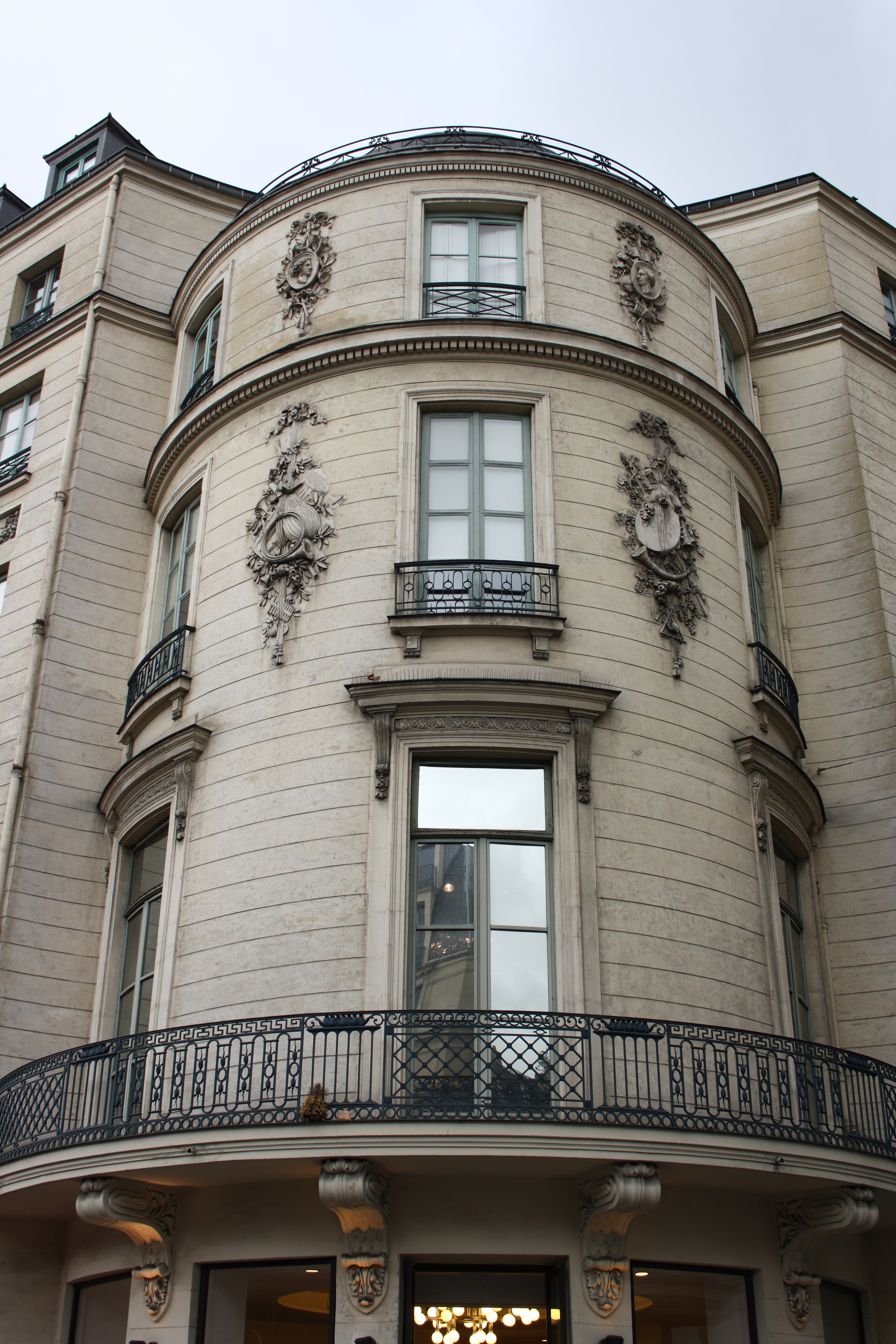 Hôtel Radix de Sainte-Foix: Ecke 2, boulevard de la Madeleine/1-3, rue de Caumartin in Paris (9. Arrondissement)